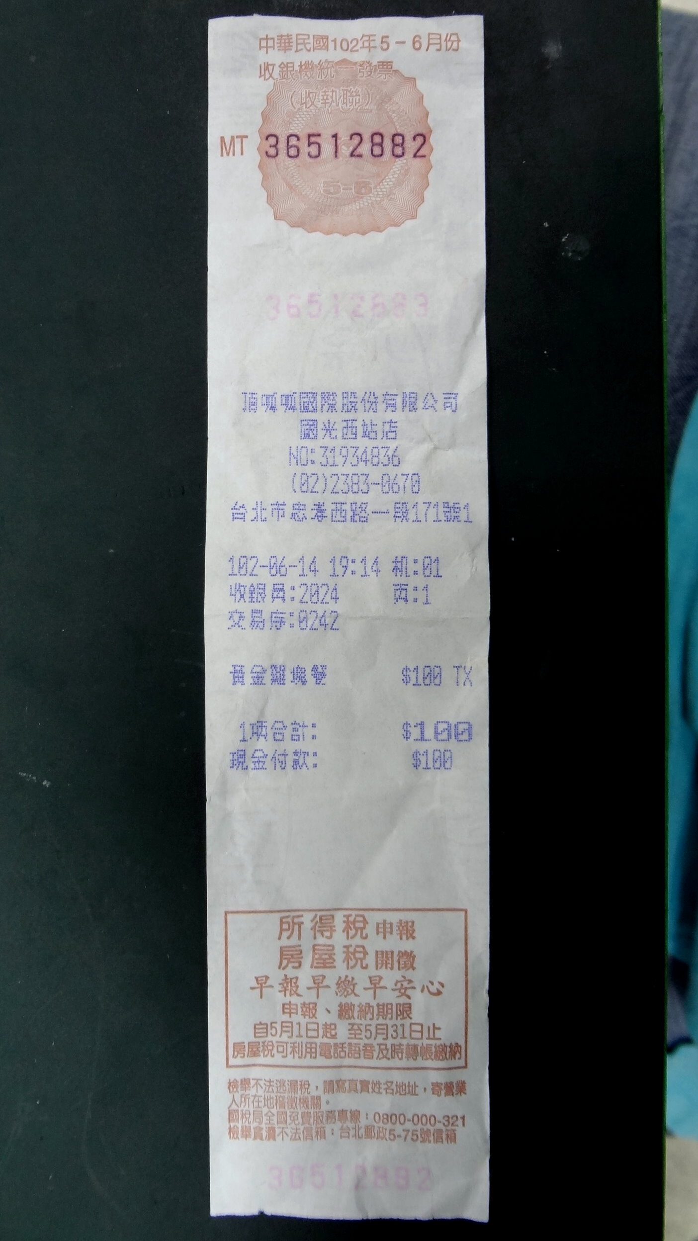 2013年6月14日，頂呱呱國光西站店開立的收銀機統一發票。